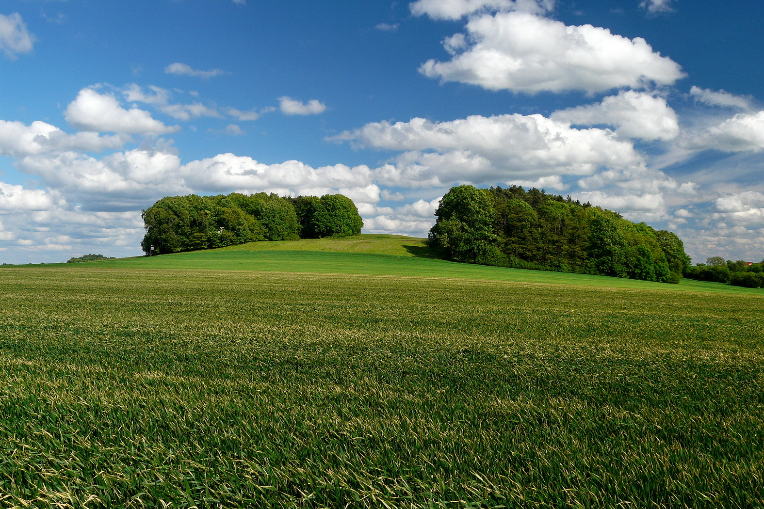 Bezdědický Kluček ze severozápadu